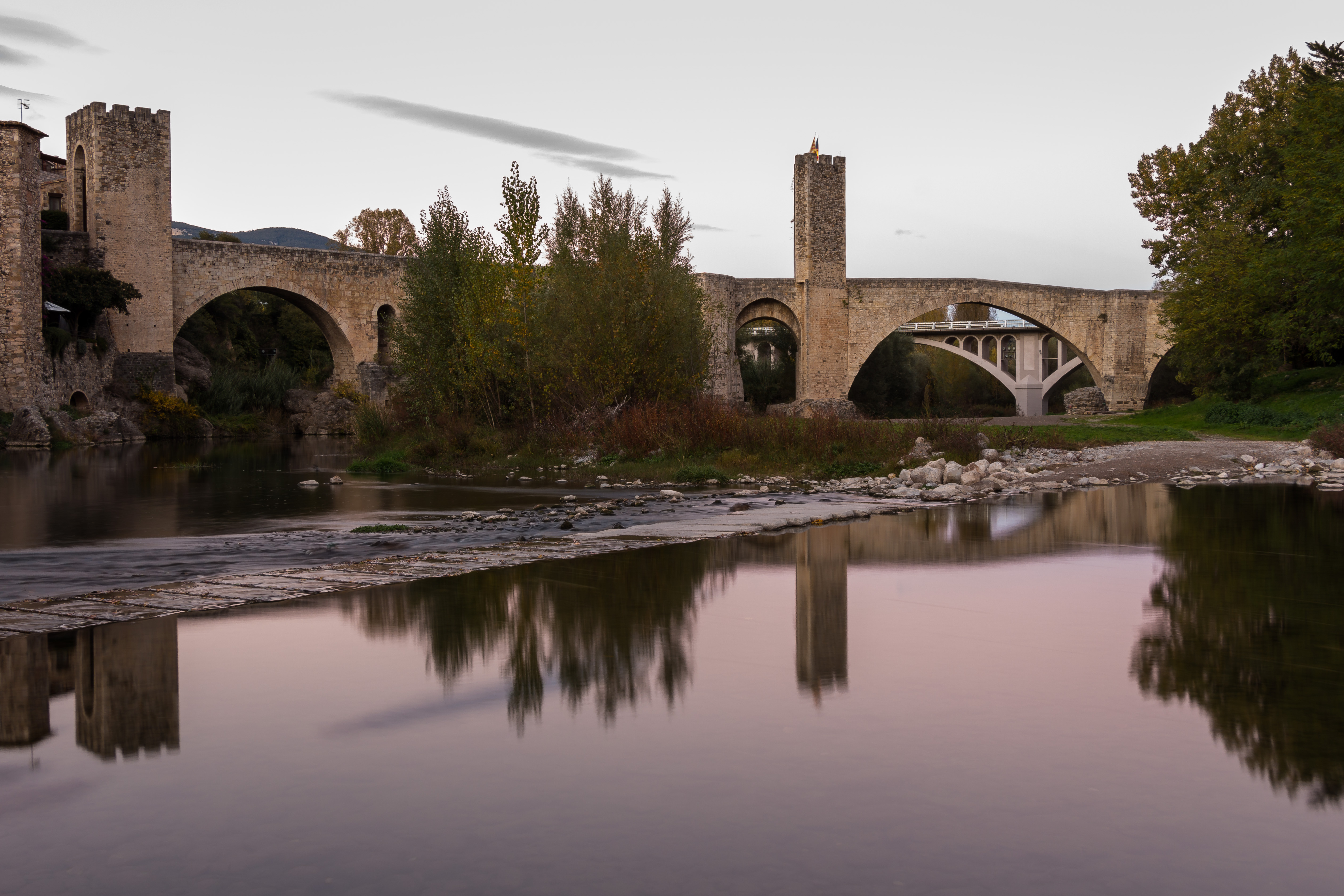 Vista del Riu Fluvià al atardecer a su paso por Besalú This is a photography of a Site of Community Importance in Spain with the ID: ES5120021. Natura2000 entry, EEA entry